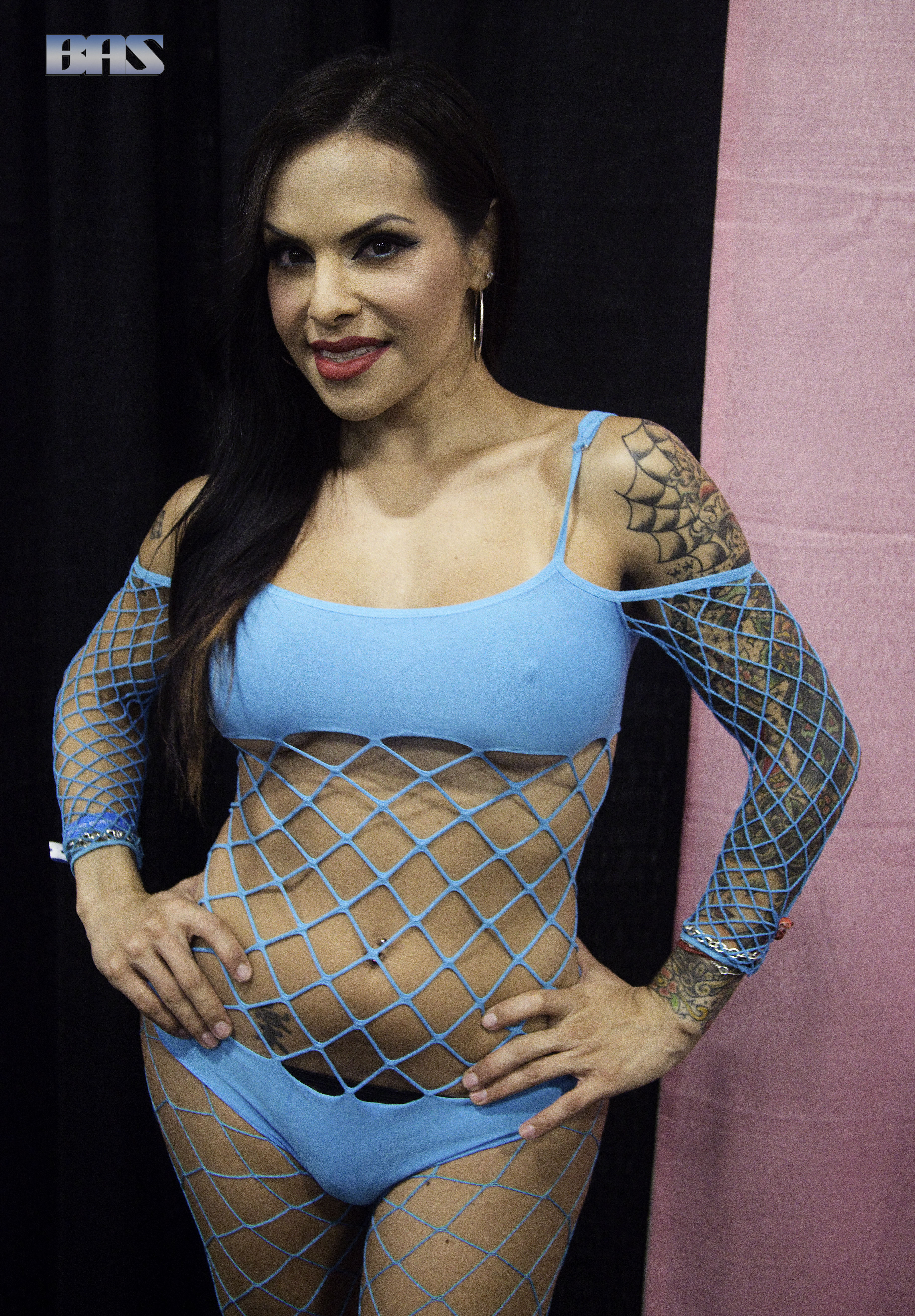 EX15_0220bas